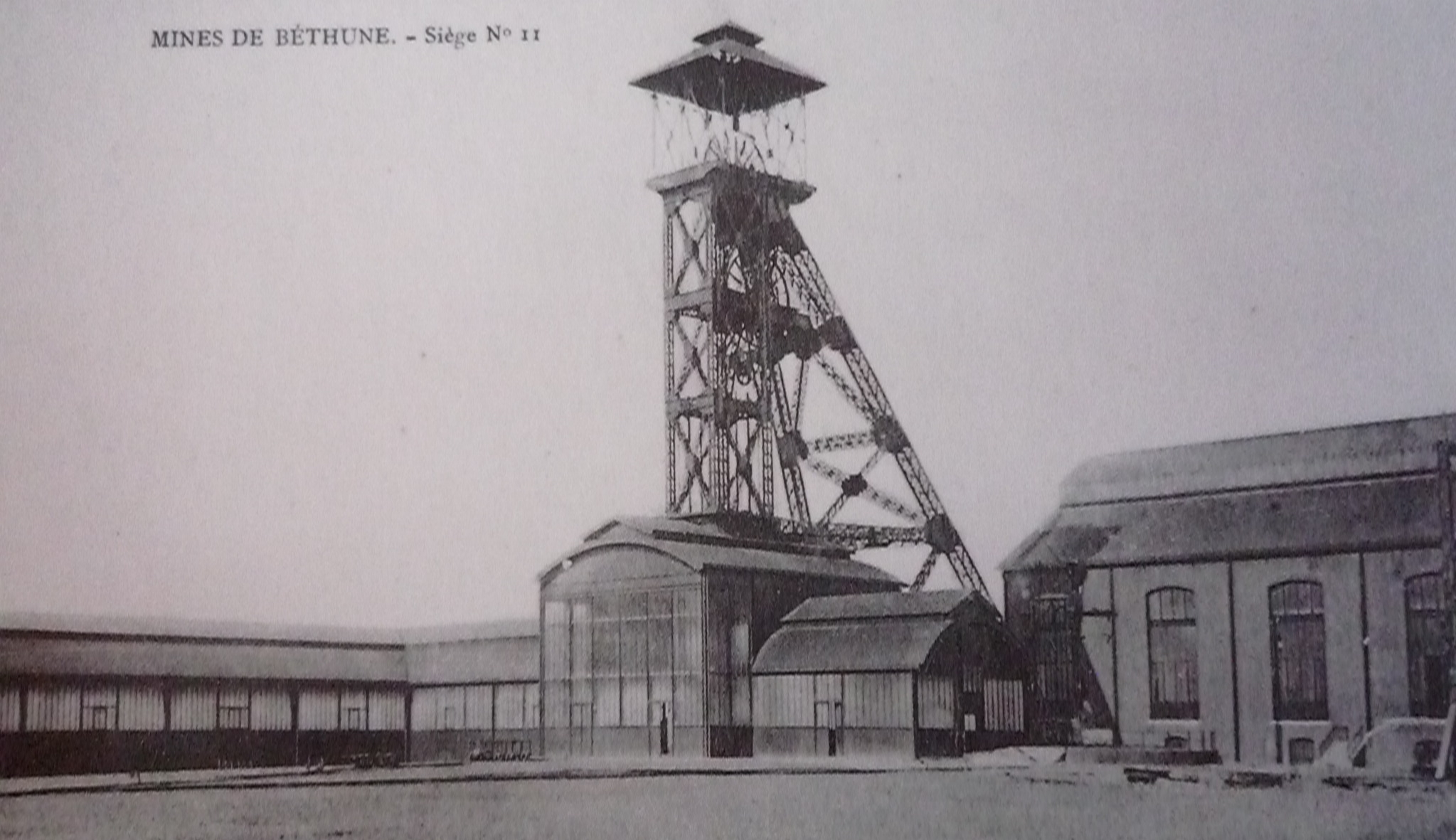 La Fosse n° 11 - 11 bis de la Compagnie des mines de Béthune était un charbonnage constitué de deux puits situé à Grenay, Pas-de-Calais, Nord-Pas-de-Calais, France.